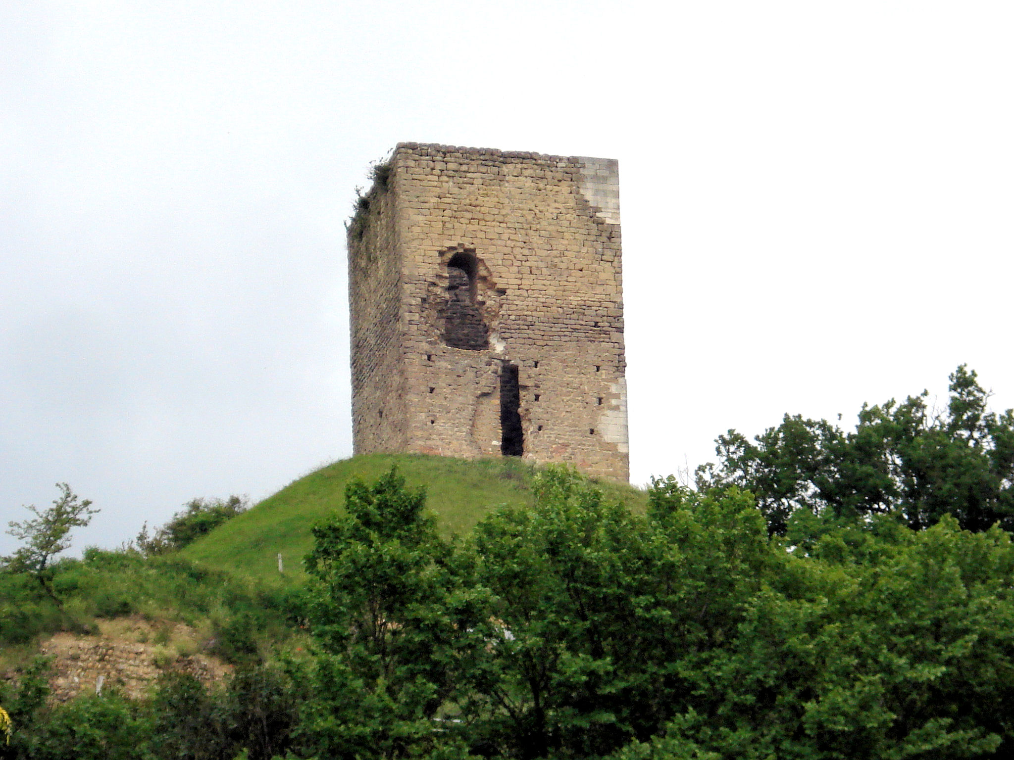 Tour d'Albon dans la Drôme